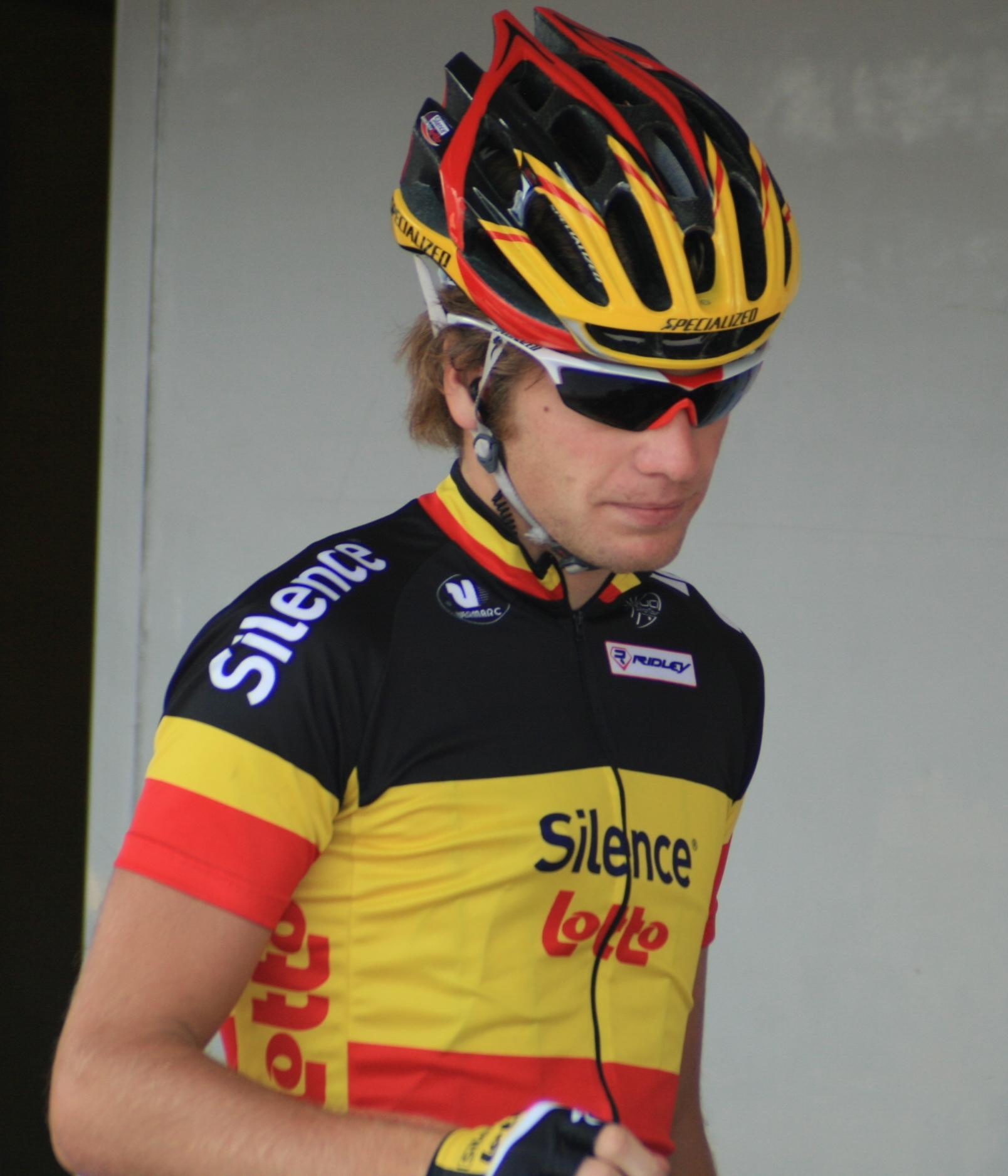 Jürgen Roelandts à l'Eneco Tour 2008, à Ardooie